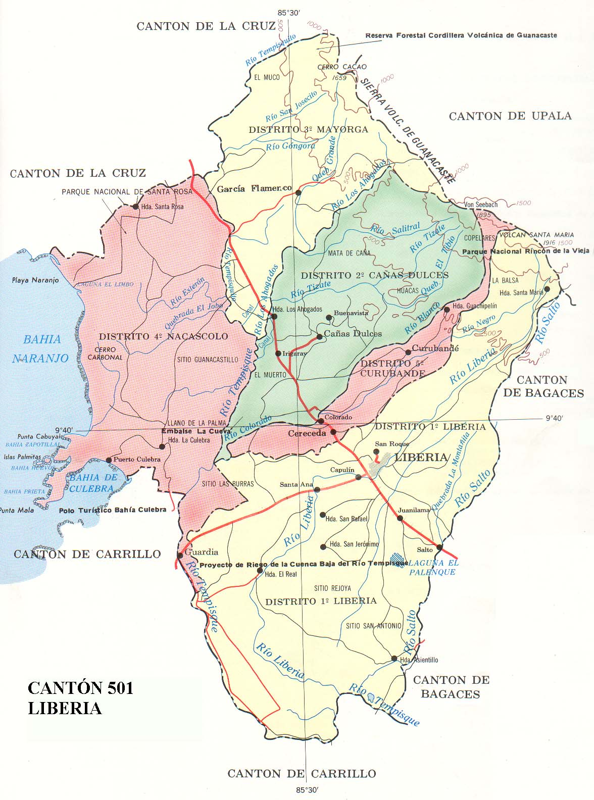 Mapa dell cantón de Liberia, Costa Rica